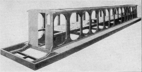 Kastenstruktur der PLM-Lokomotive 262-AE